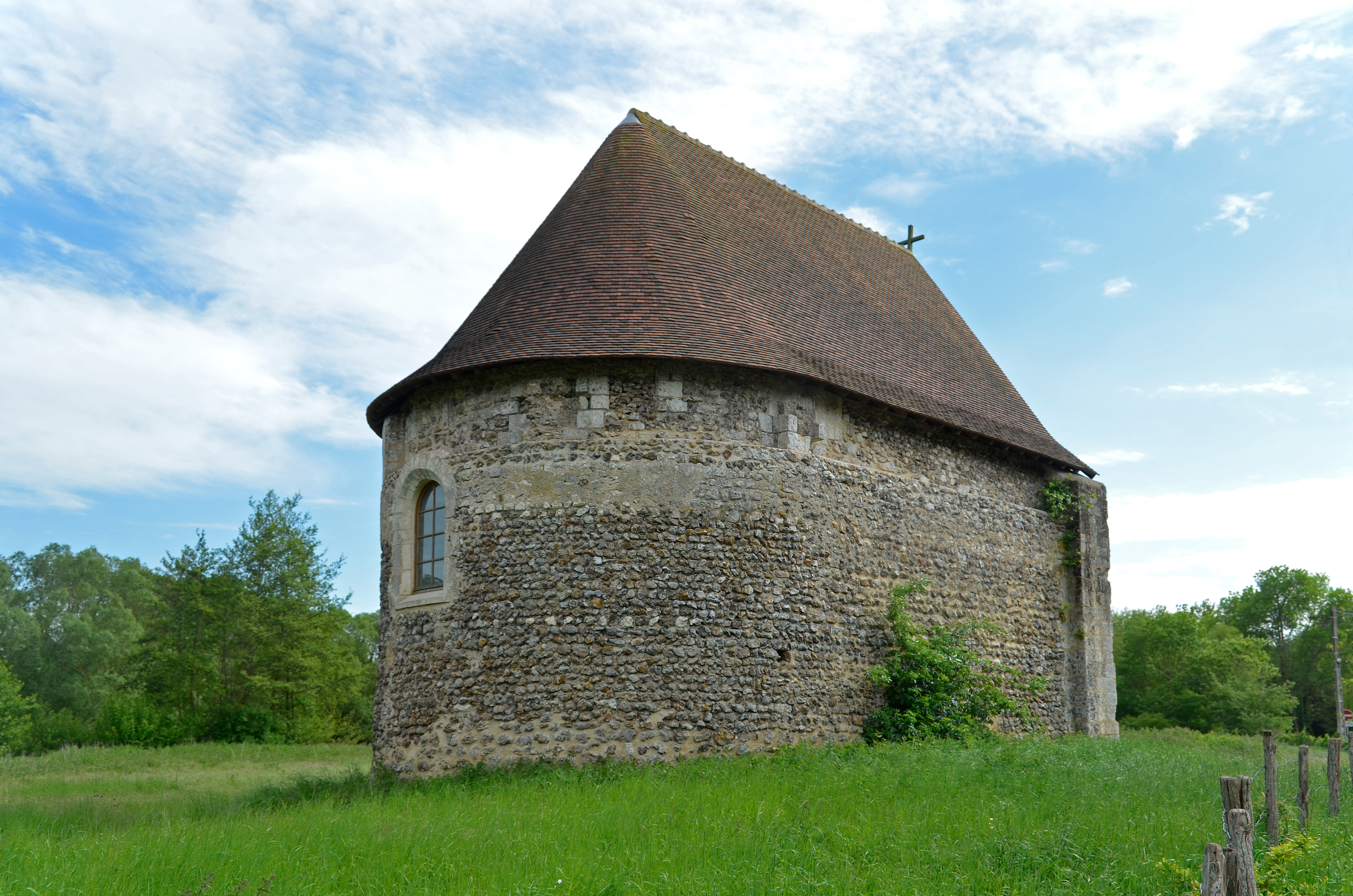 chapelle Saint-Pierre de Vouvray, Saint-Denis-les-Ponts, Eure-et-Loir, France.